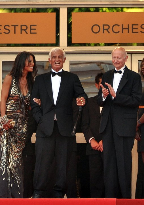 Hommage à Jean-Paul Belmondo au festival de Cannes; à gauche sur la photo, Barbara Gandolfi, à droite Gilles Jacob